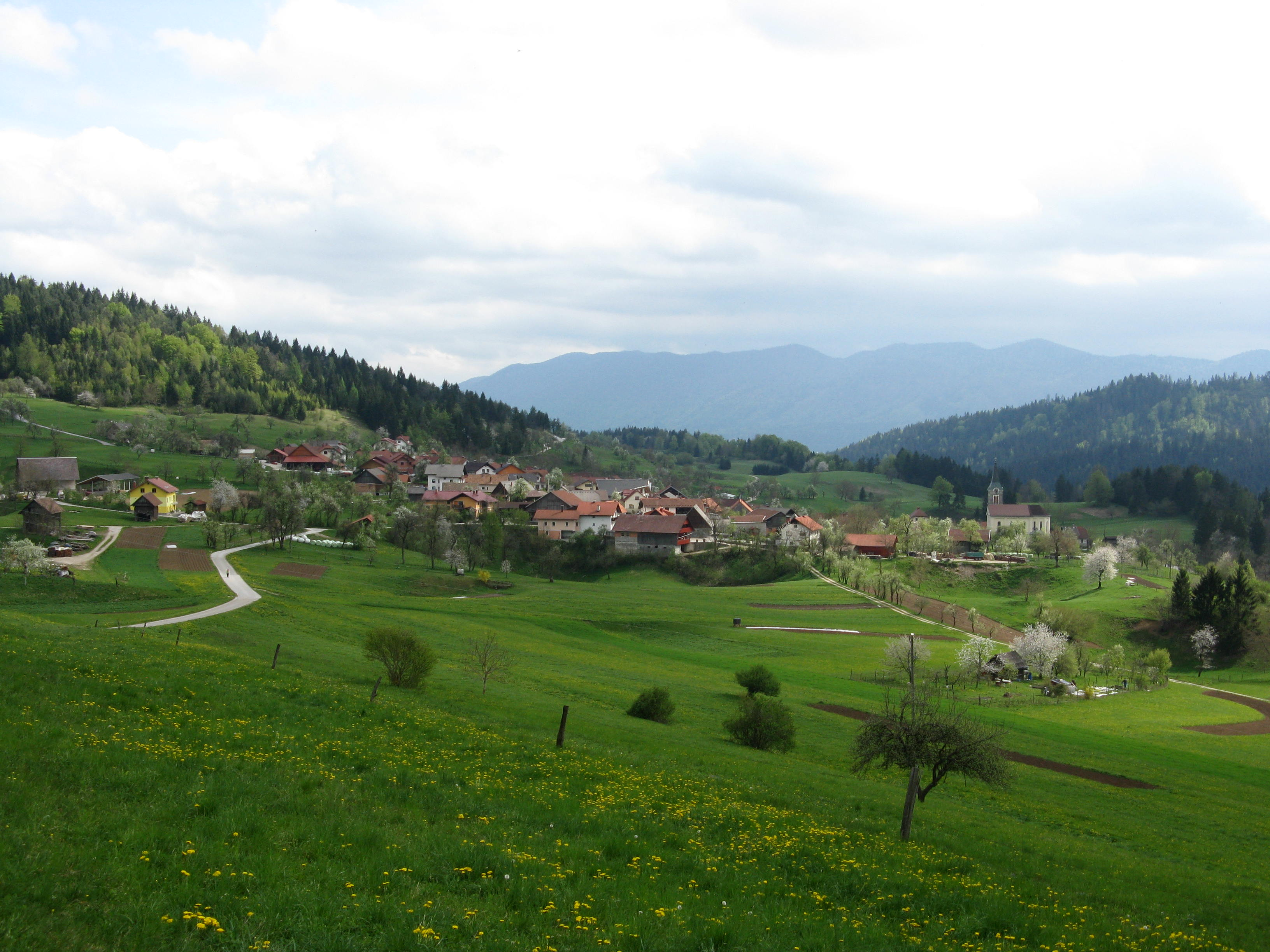 Severni pogled na Velike Poljane